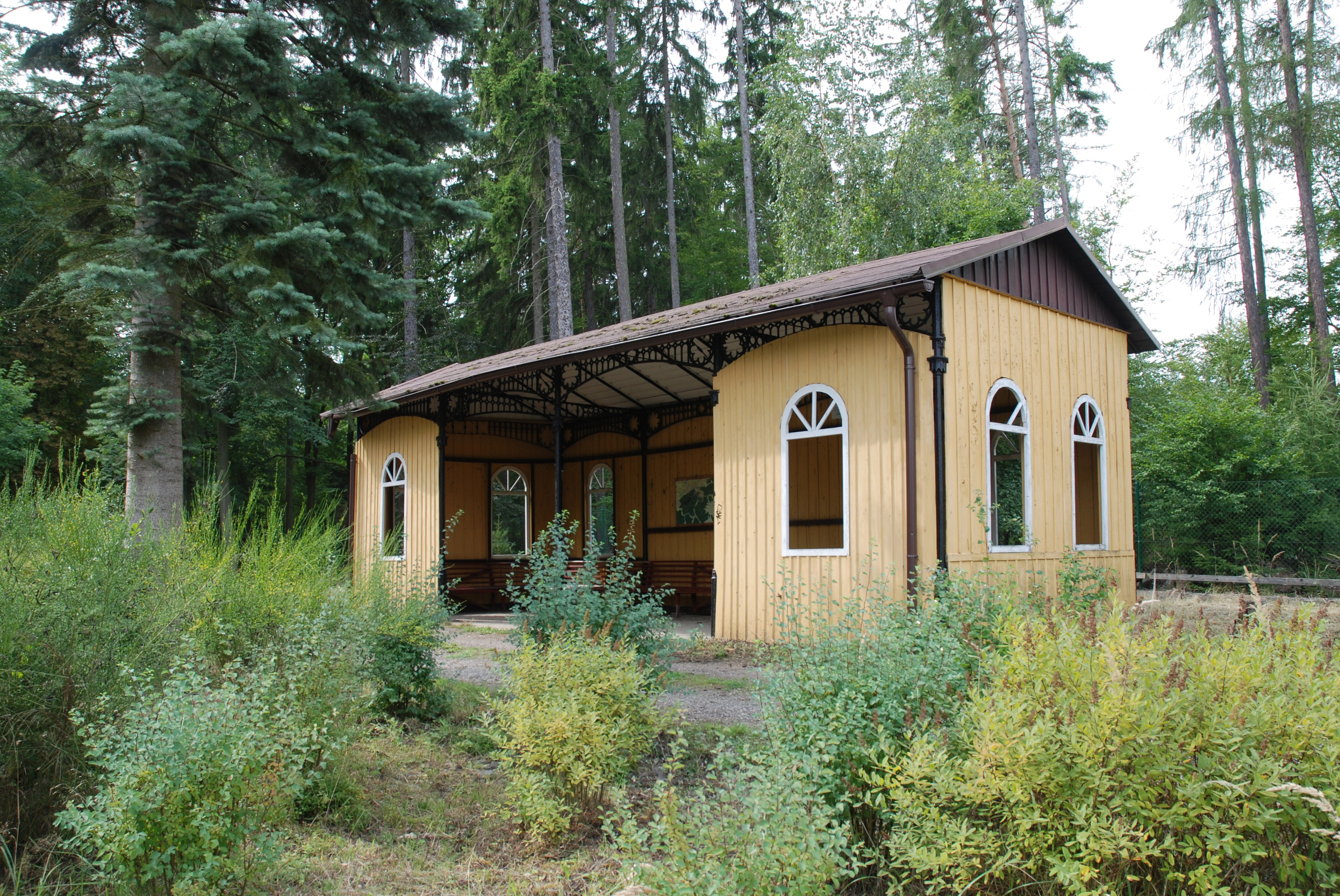 Fibichův altán v karlovarských lázeňských lesích